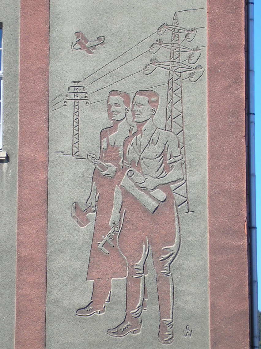 Eine Wandbemalung am Faraday-Bau der TU Ilmenau aus den 1930er-Jahren.